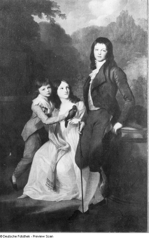 Karl August's children by Luise Auguste: Karl Frederick, the future Grand Duke, Karoline Luise and Karl Bernhard.